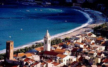 Noli view